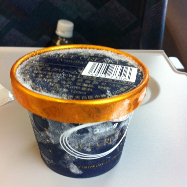 新幹線のアイスクリーム、なぜ固い？ (1/2) (2/2)